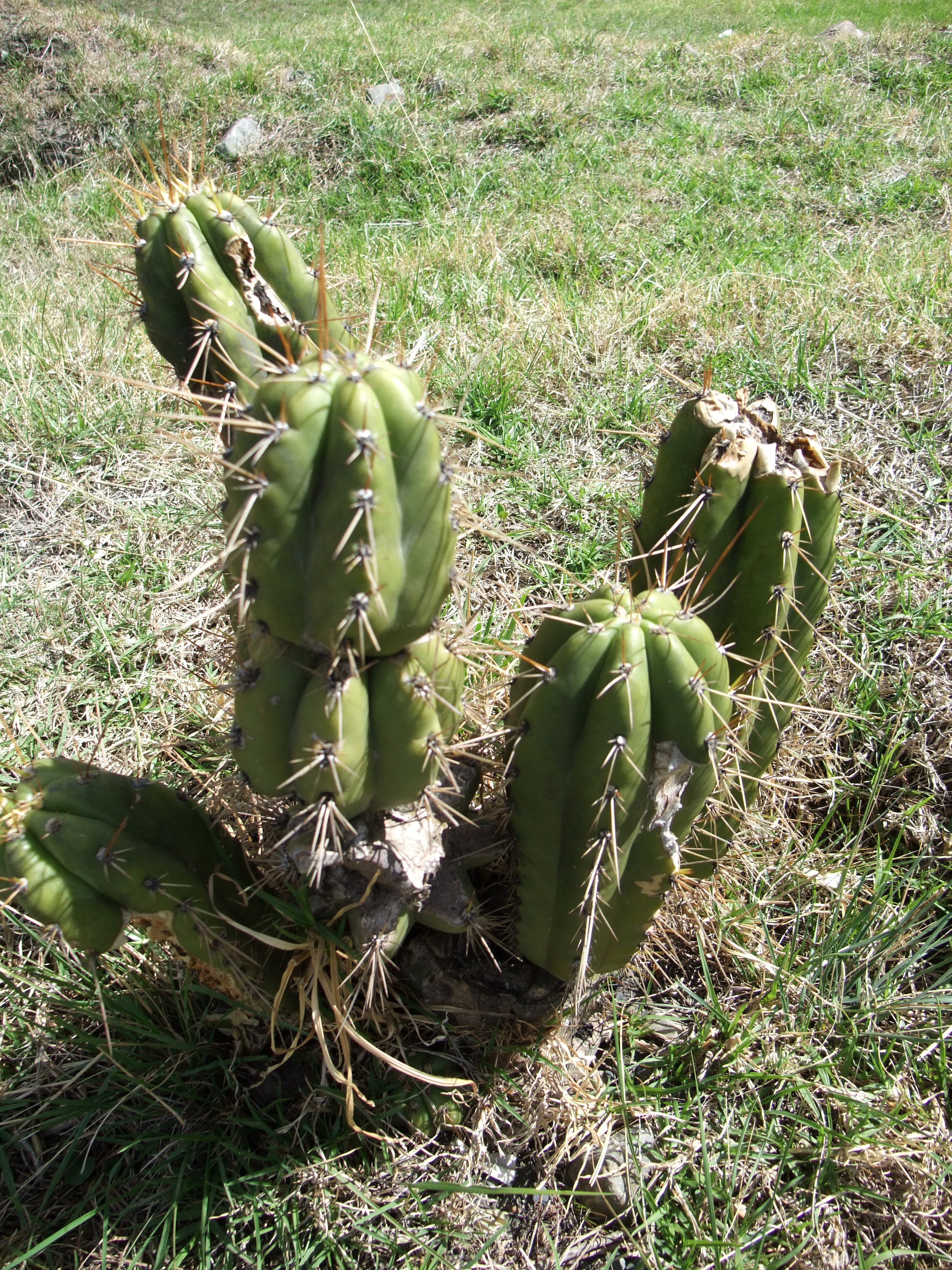 Cactus Hallucinogène "San Pedro" utilisé par les prêtres de la culture Chavín. Le Cactus est reconnaissable par sa forme étoilée à 7 branches.